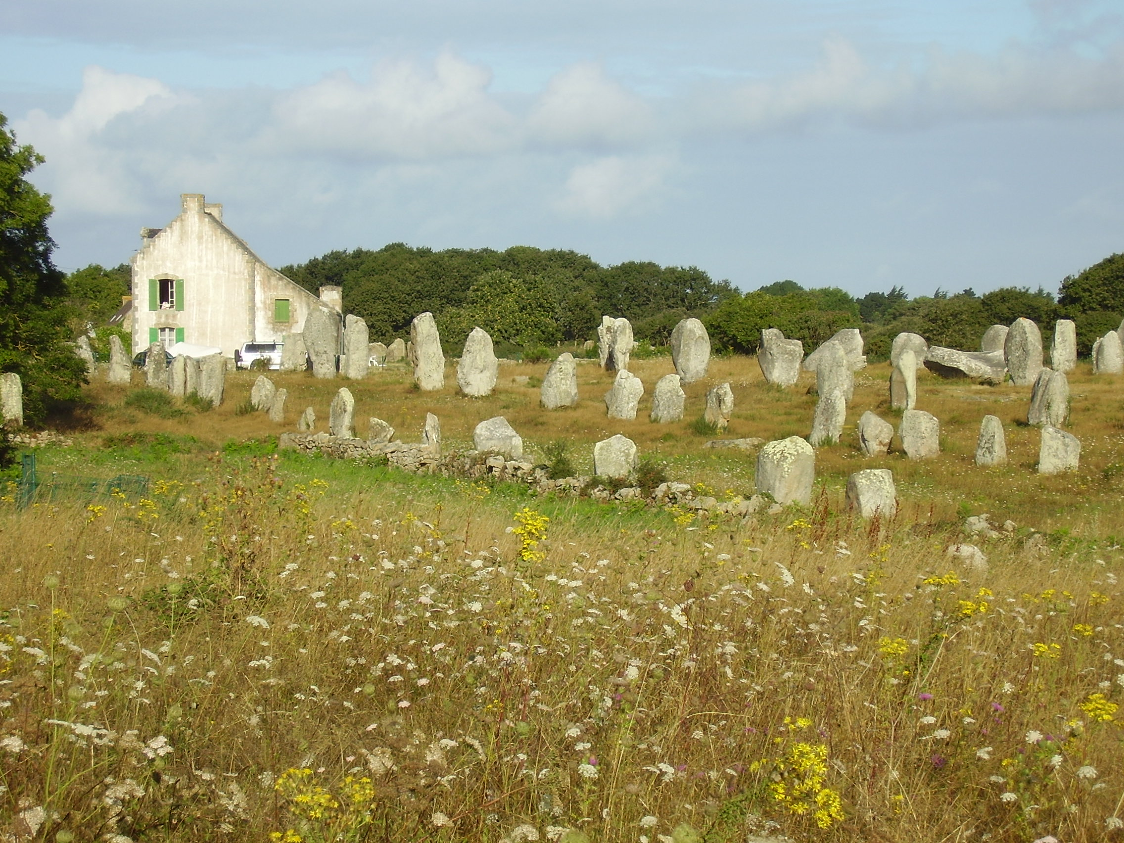 Carnac, France